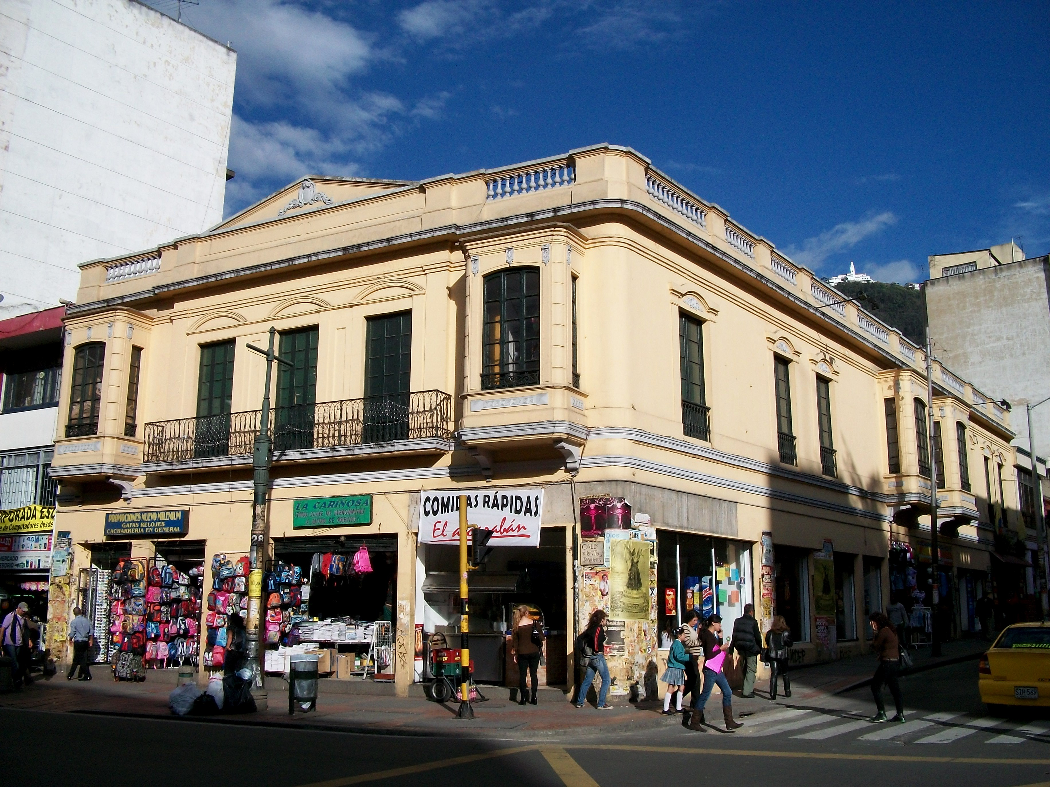 Esquina de la carrera 7 con calle 22 en Las Nieves, Bogotá.